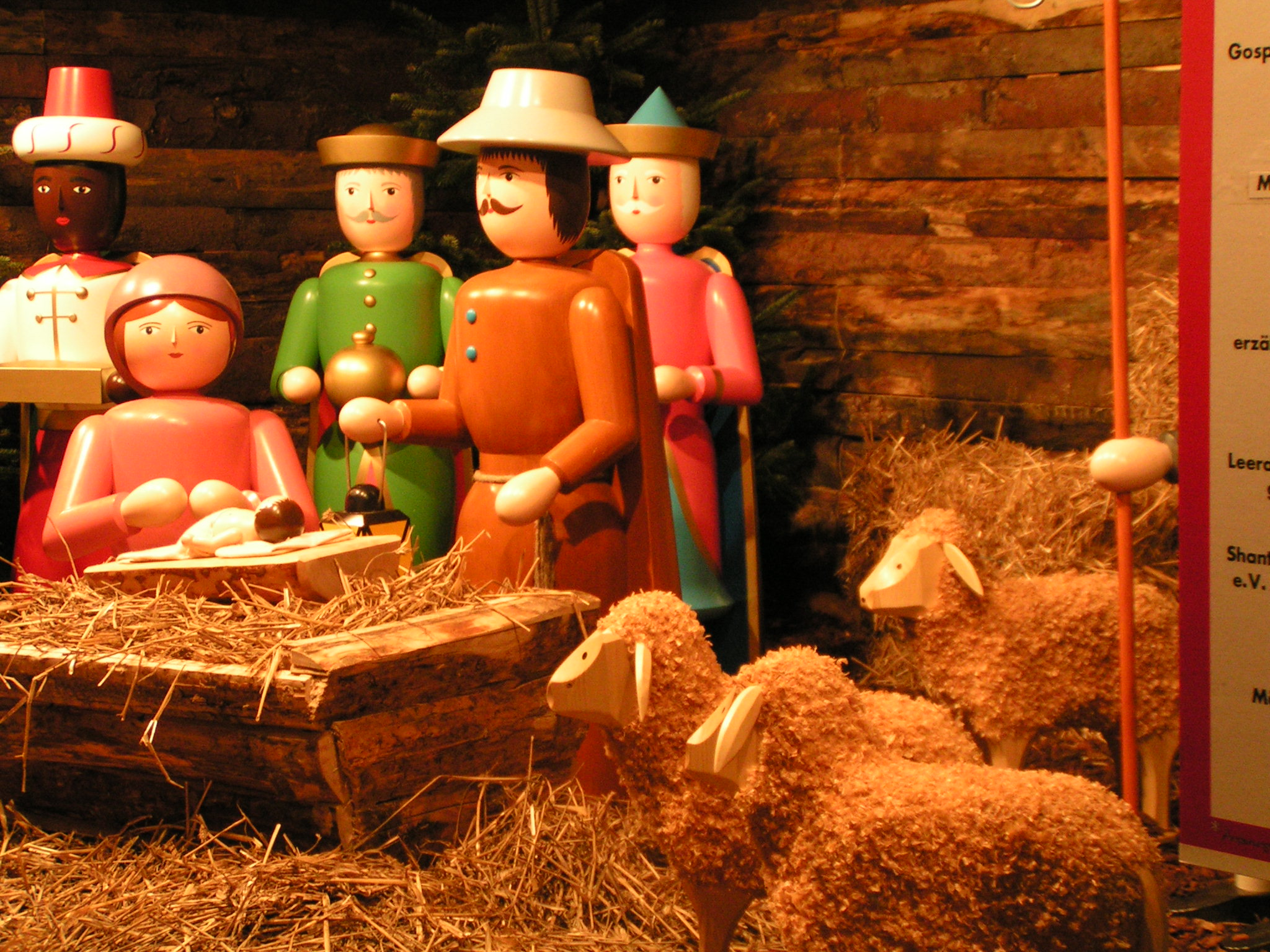 Weihnachtskrippe mit Figuren aus dem Erzgebirge auf dem weihnachtsmarkt in Leer (Ostfriesland)